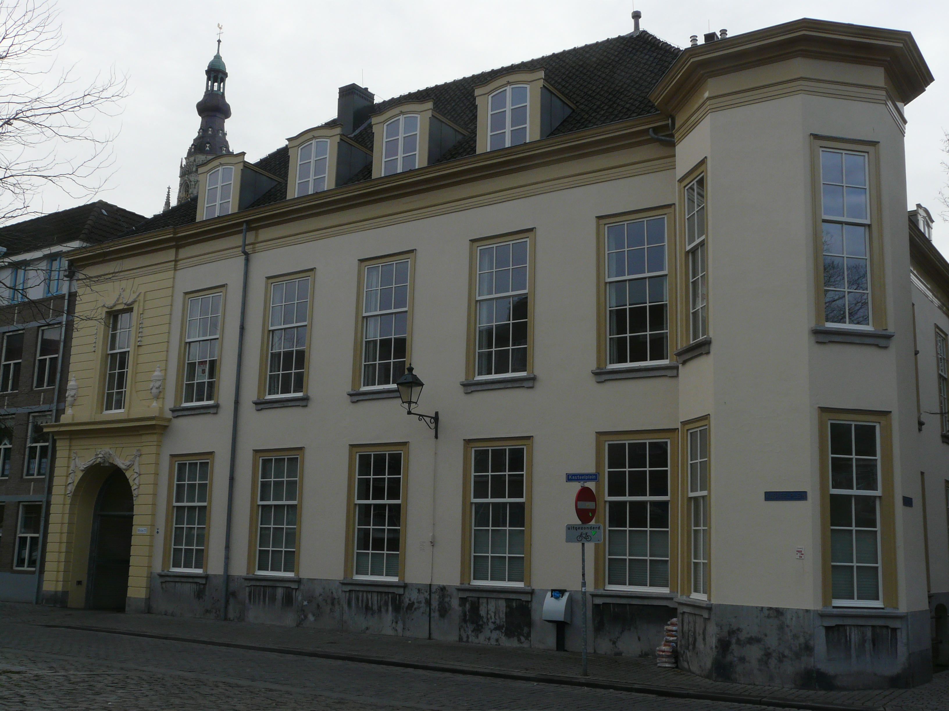 Zicht op een deel van het voormalige Gouvernementshuis bij het Kasteelplein in het centrum van Breda